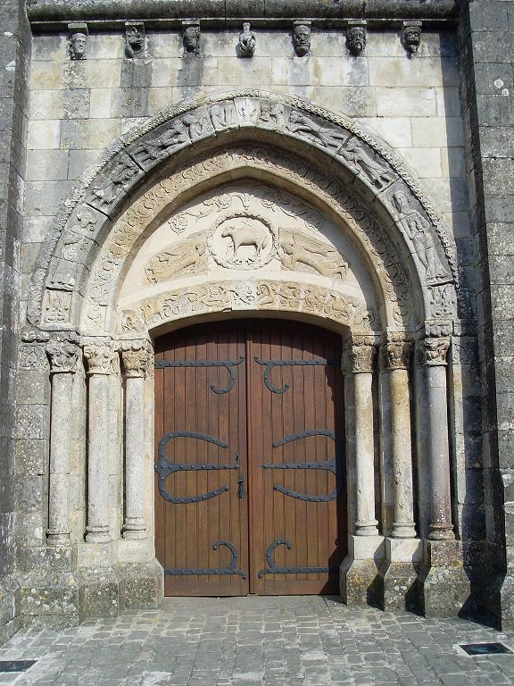 Le portail de l'Eglise St Michel à Champagne-Mouton. (XIIème siècle, déplacé au XIXème siècle, comme le témoigne la voute supérieure brisée)